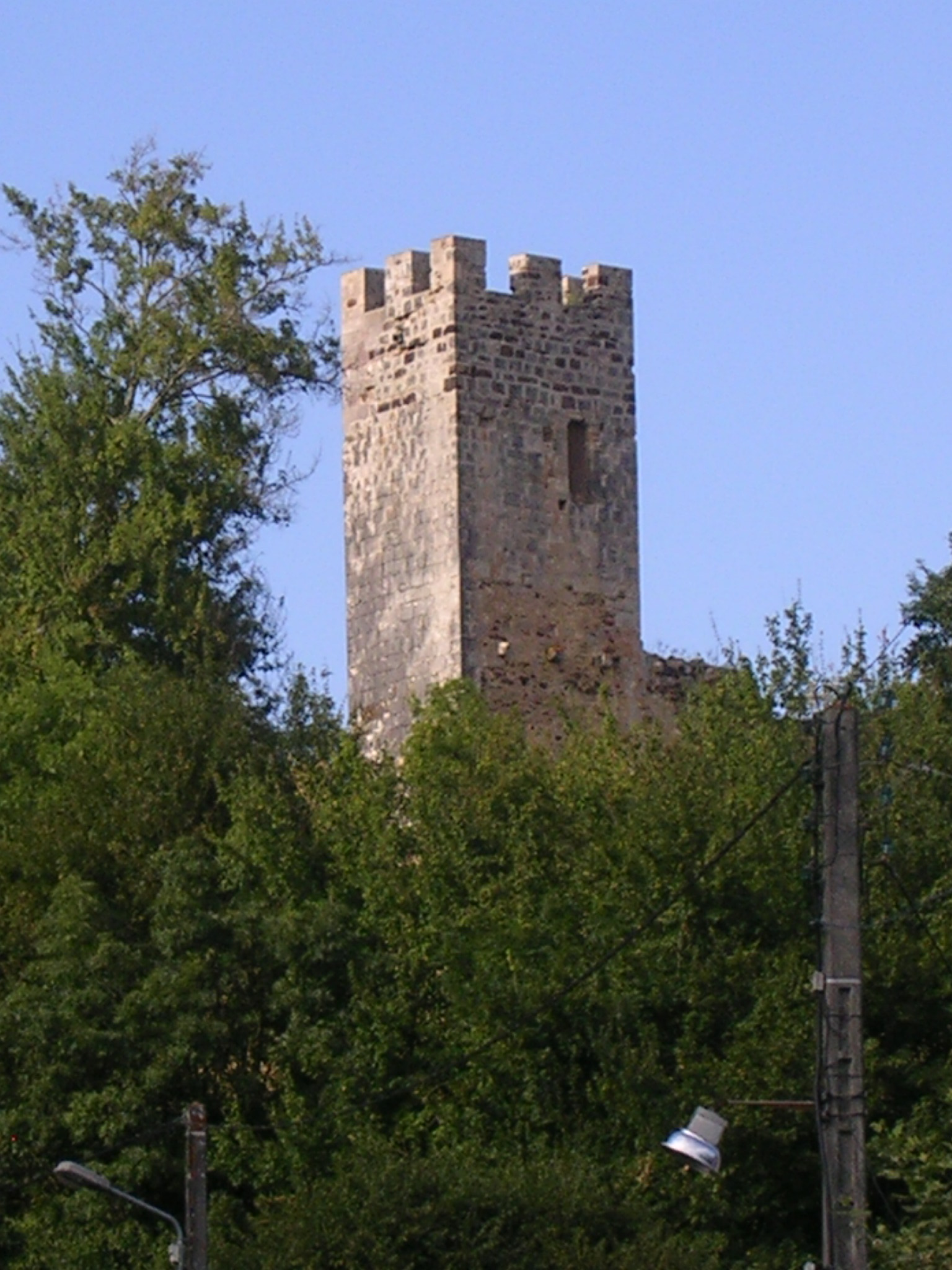 Vestige du château de Sault (tour et mur) à Sault-de-Navailles, dans le département français des Pyrénées-Atlantiques